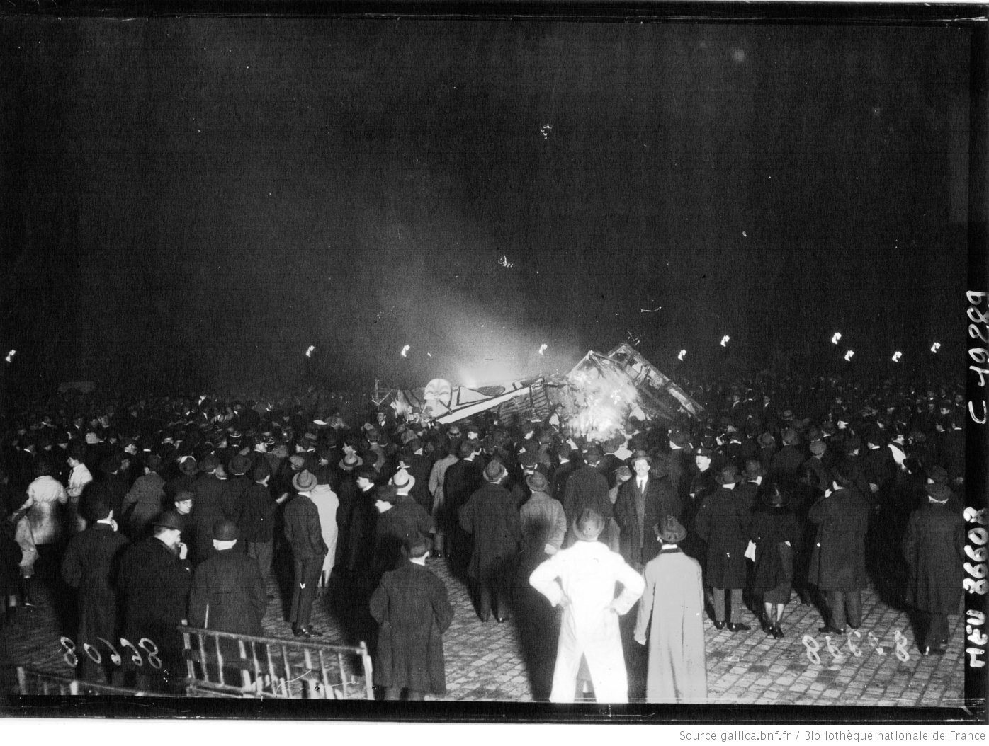 Balade du Rougevin